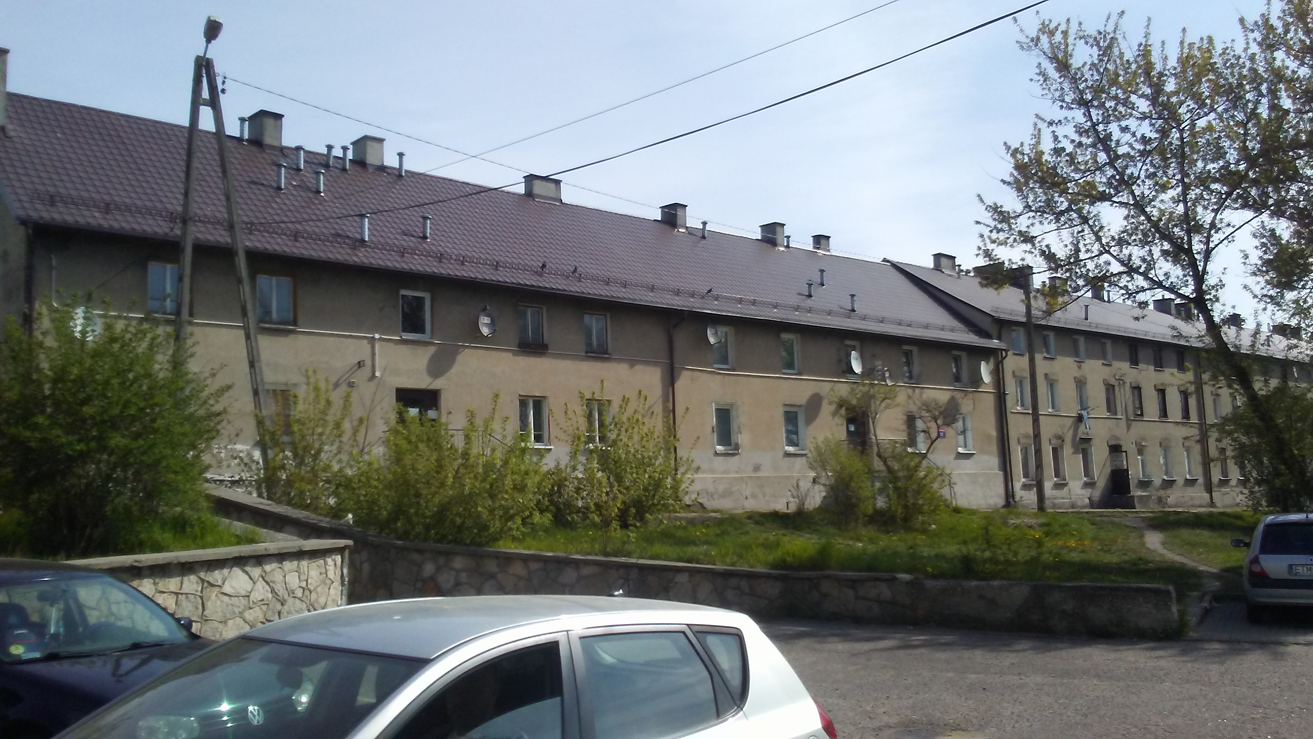 Kamienica Krycha, Niebrowska Street 10, Tomaszów Mazowiecki